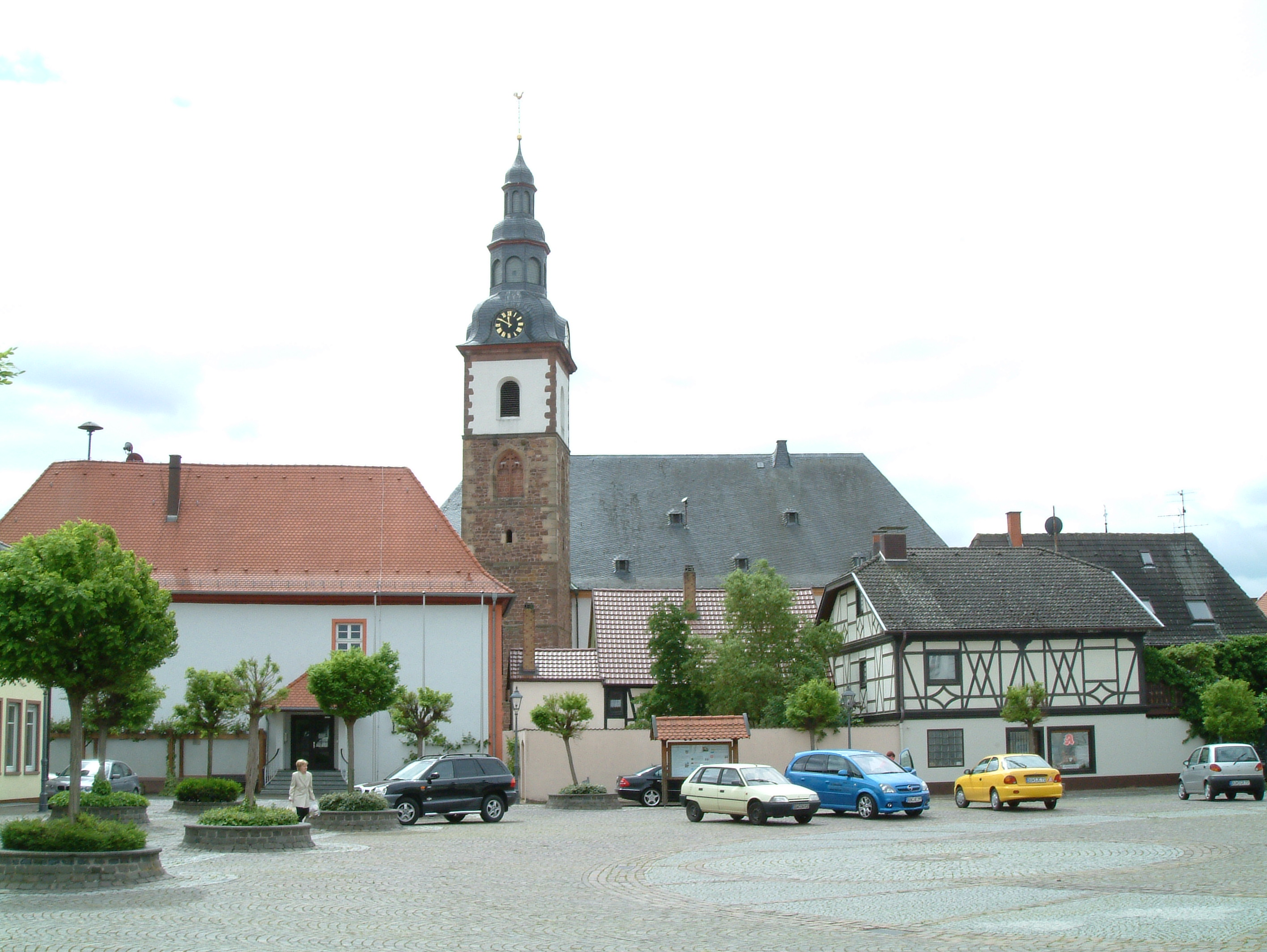 Schlossplatz-Südseite zu Dirmstein